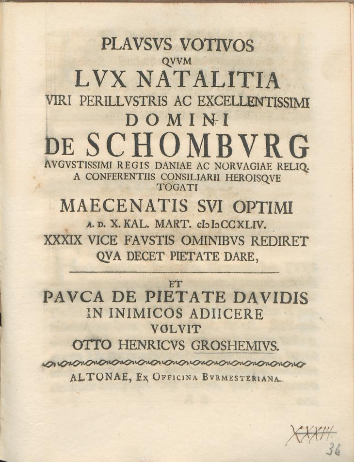 Titel einer Gelegenheitsschrift: Geburtstagslaudatio auf Bernhard Leopold Volkmar von Schomburg (1705-1771), lateinisch